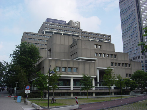 Hogeschool van Amsterdam gebouw Leeuwenburg naast het Amstelstation